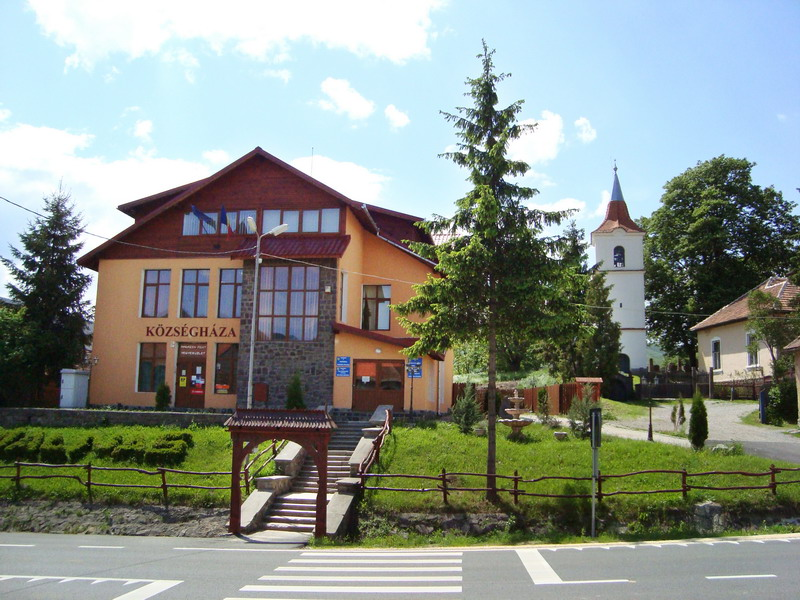 MÁLNÁS KÖZSÉG KOVÁSZNA MEGYE